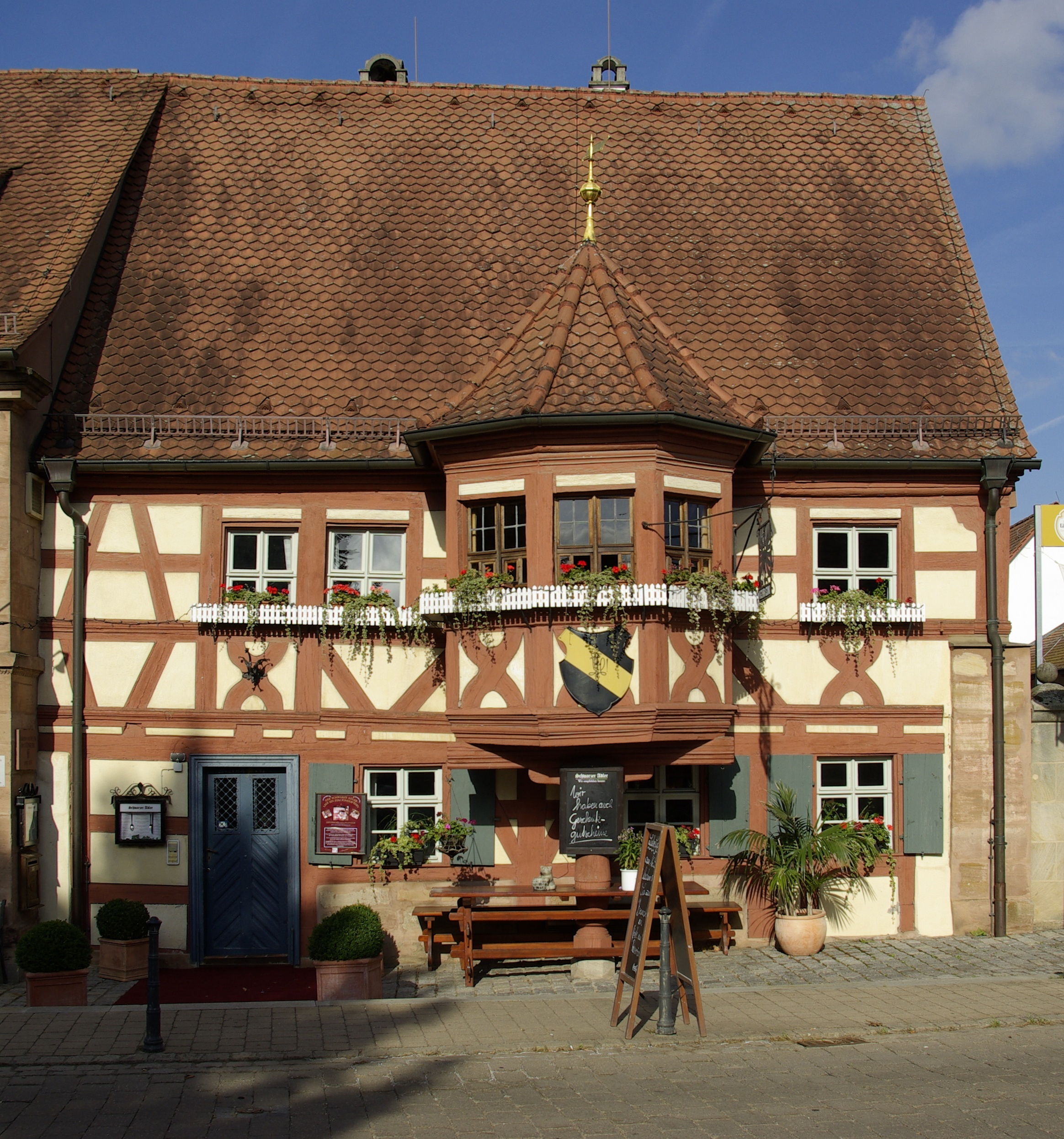 Gasthaus Schwarzer Adler in Uttenreuth im Landkreis Erlangen-Höchstadt.